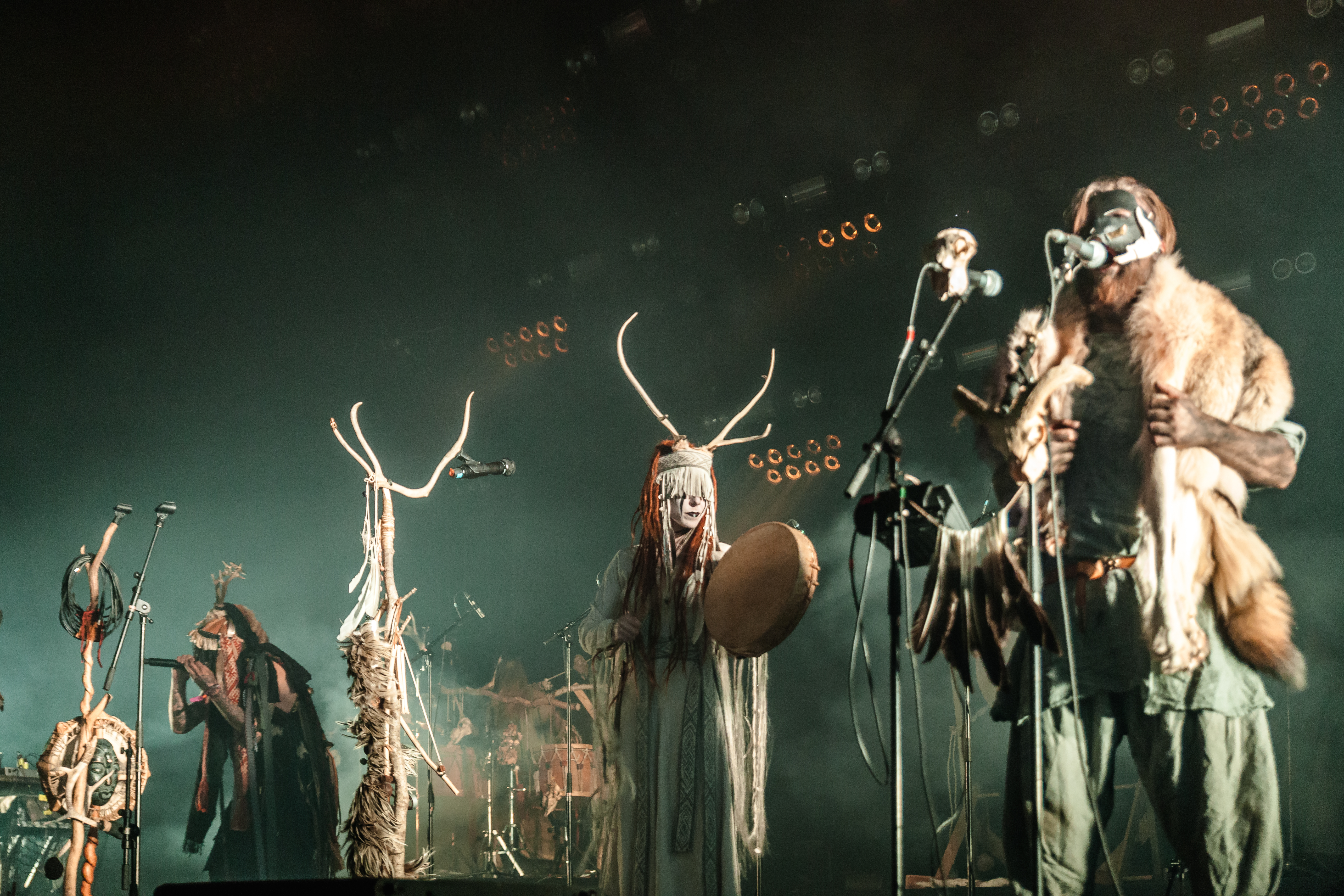 Festivalsommer This photo was created with the support of donations to Wikimedia Deutschland in the context of the CPB project "Festival Summer".